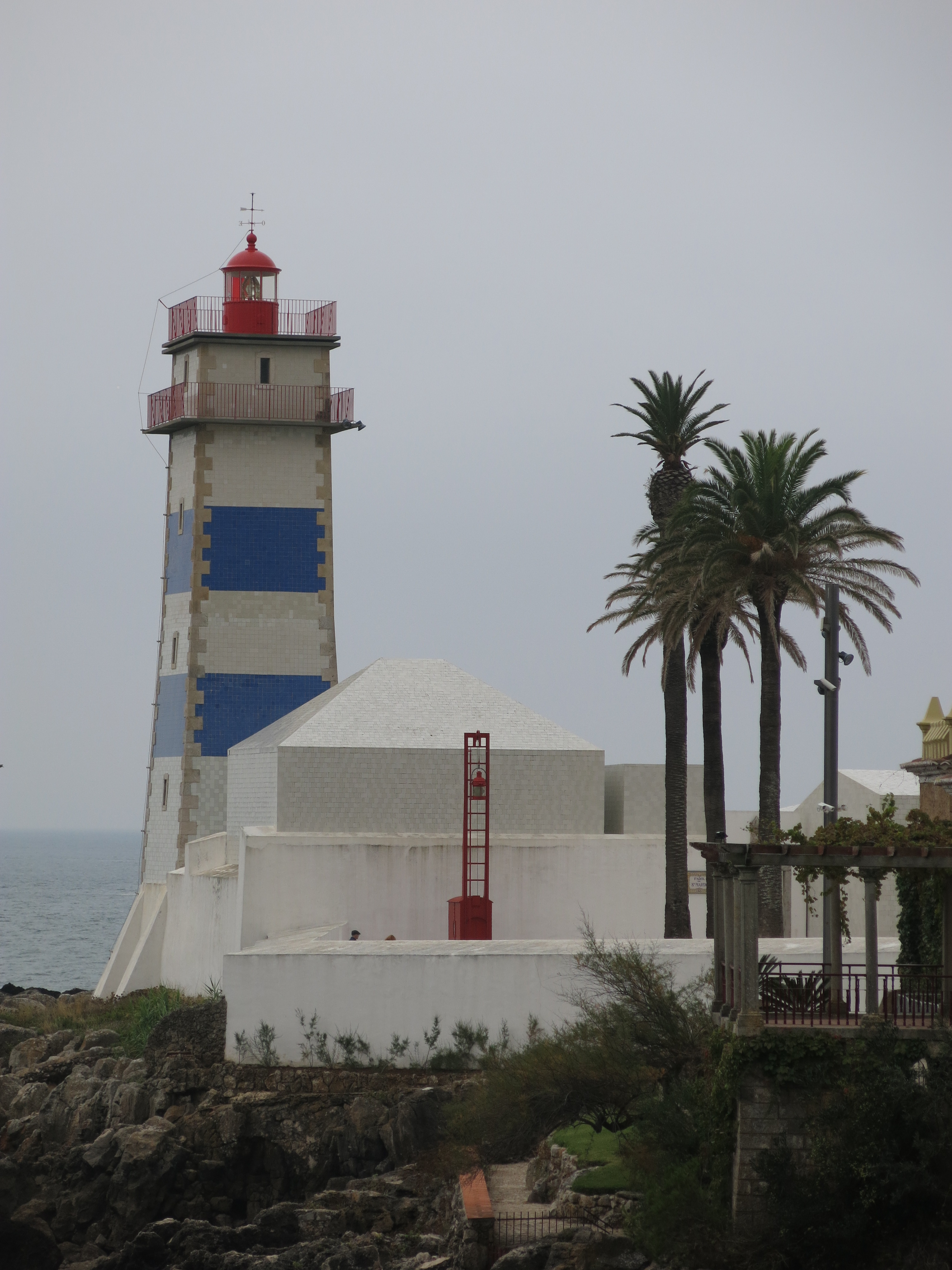 2016-10-21_Cascais_6192